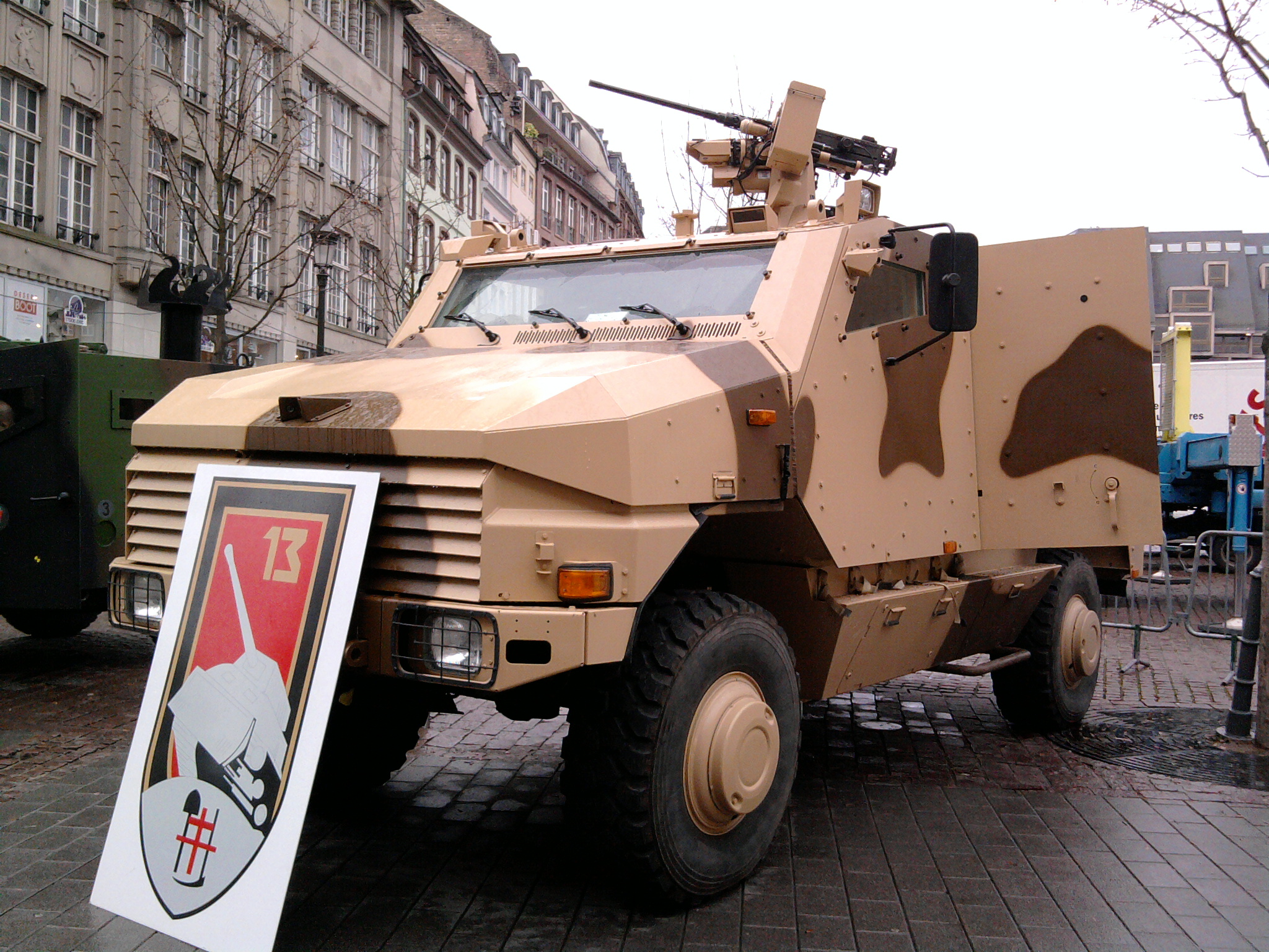 Camion blindé en présentation à Strasbourg, Place Kléber